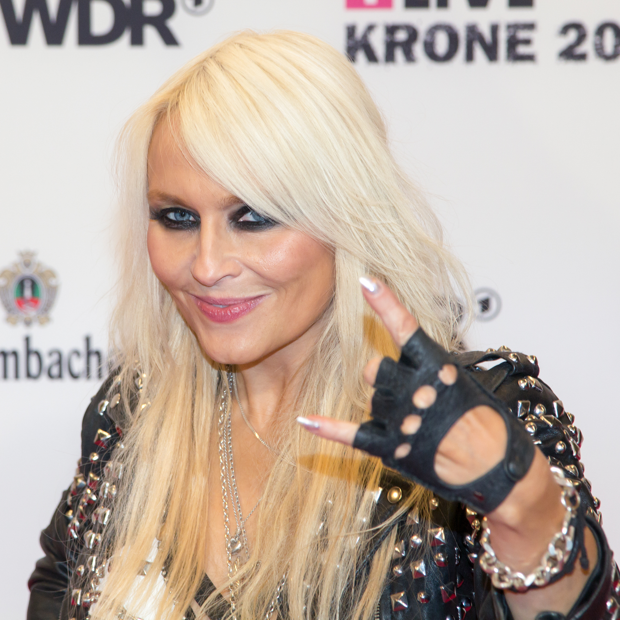 1LIVE Krone 2014 in der Bochumer Jahrhunderthalle: Doro auf dem roten Teppich